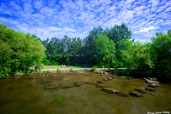 From Reykjavik Park & Zoo in Iceland.